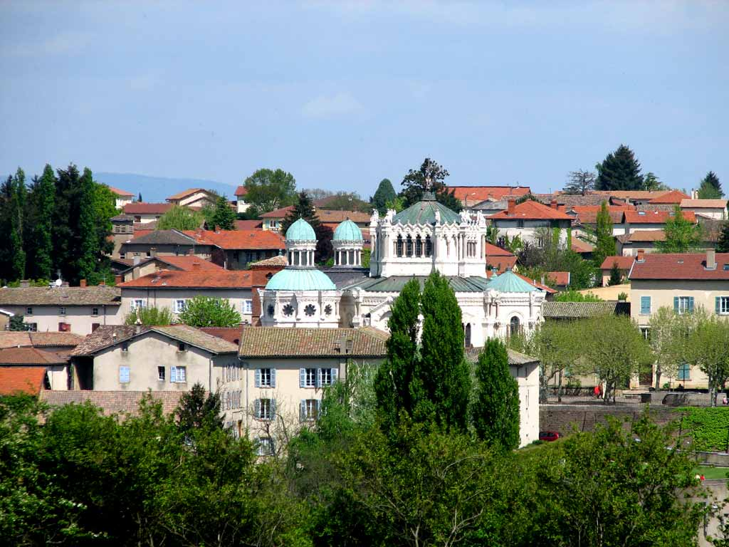 Ars-sur-Formans